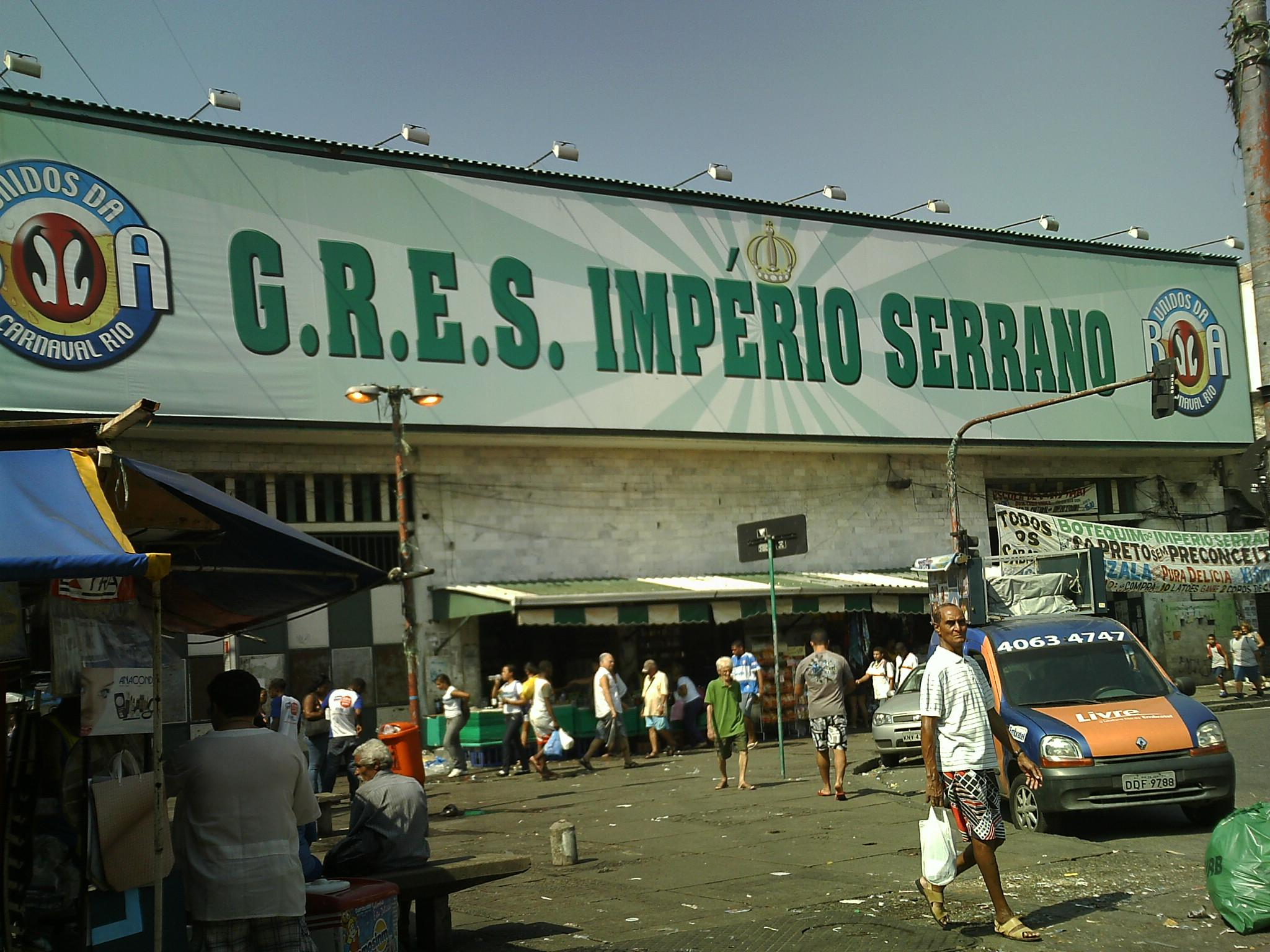 sede do GRES Império Serrano.